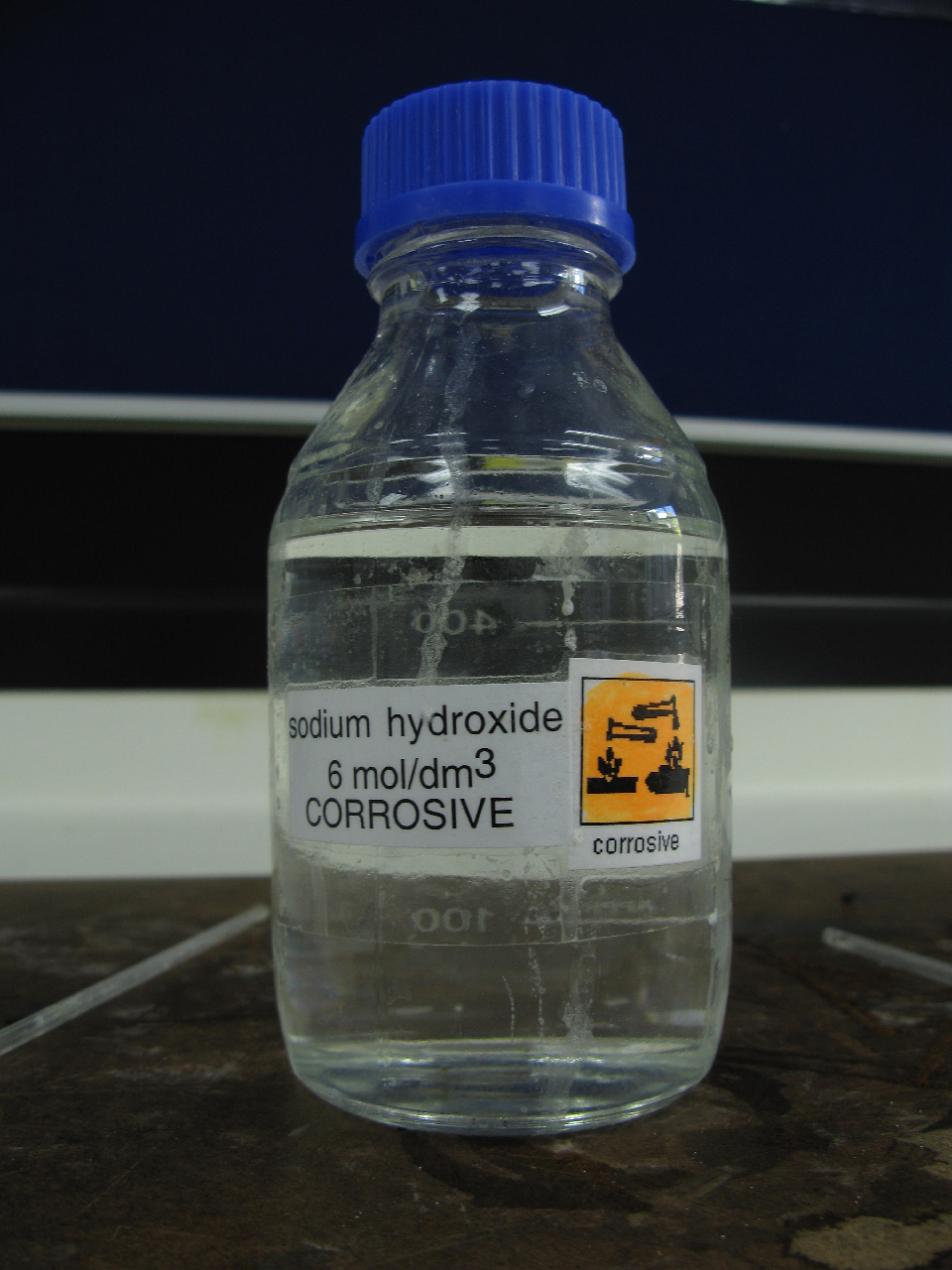 Sodium Hydroxide 6mol Corrosive Lab Chemicals